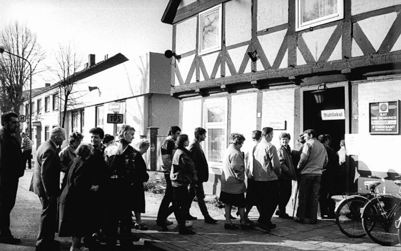 ADN-ZB Pätzold 18.3.90 Bez. Schwerin: Wahl 90. Warteschlangen bildeten sich vor dem Wahllokal in der Gemeinde Neuhaus Kreis Hagenow in den Vormittagsstunden.